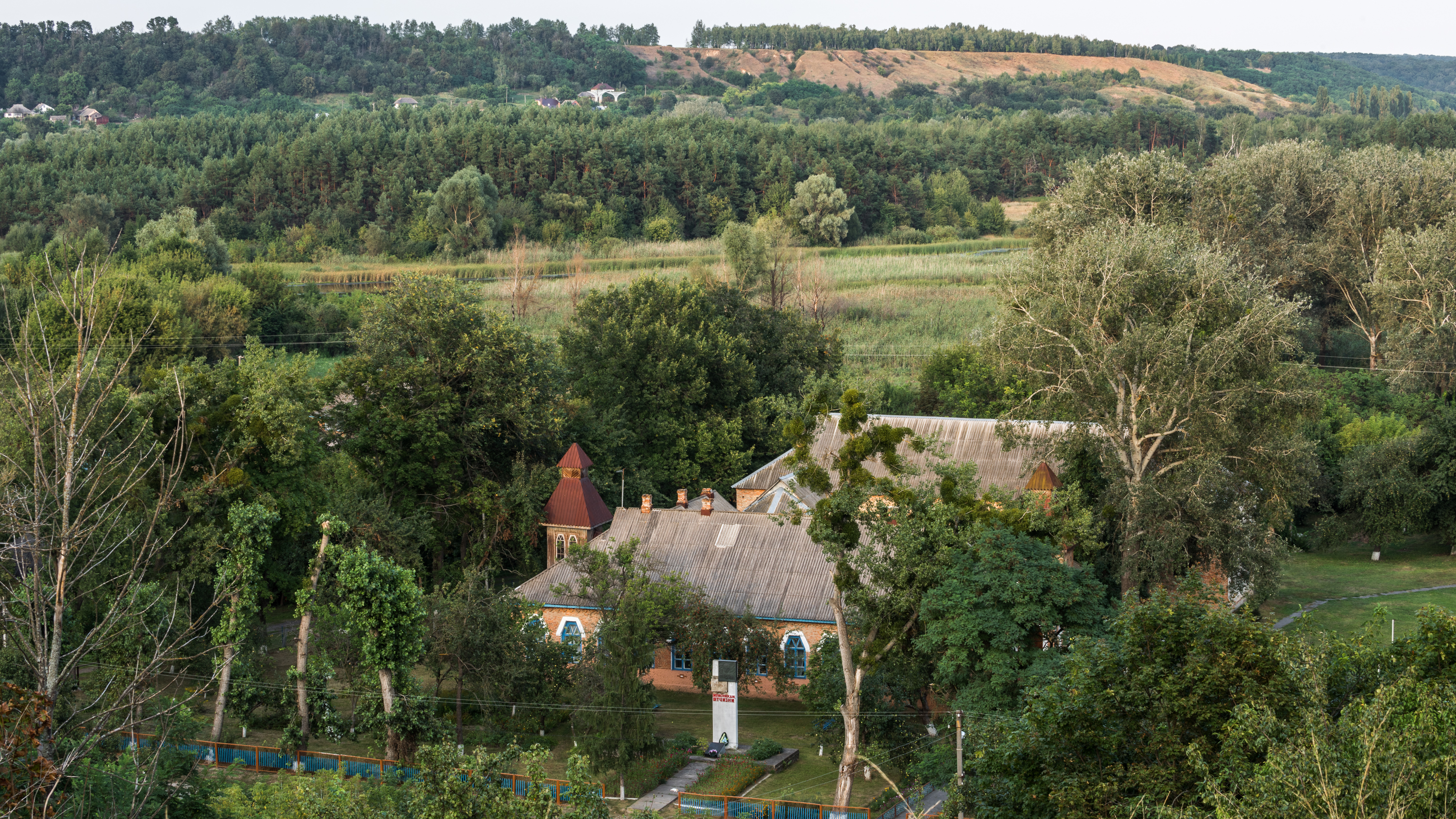 Земська школа в селі Курінька, Чорнухинського району, Полтавської області.